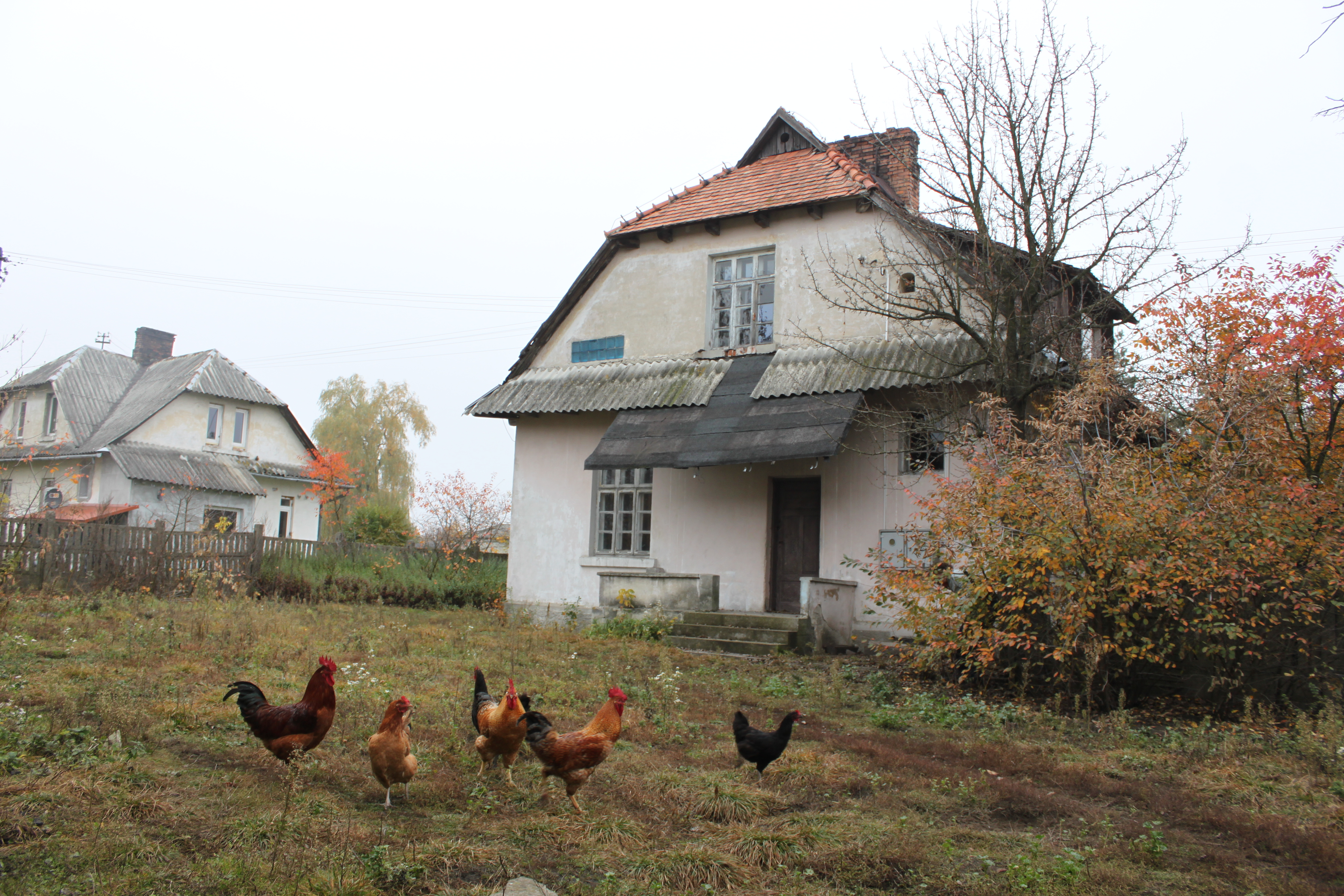 Ehemalige Kommandantur vom Vernichtungslager Belzec außerhalb des Lagers an der Hauptstraße des Ortes Belzec, hofseitige Gebäudeansicht mit Eingang, dort vorhandene und gehaltene Hühner mit einem Hahn wurden von mehreren Fotografen auf die Stelle getrieben, wo einst die SS-Leitung für ein Foto Aufstellung genommen hat.